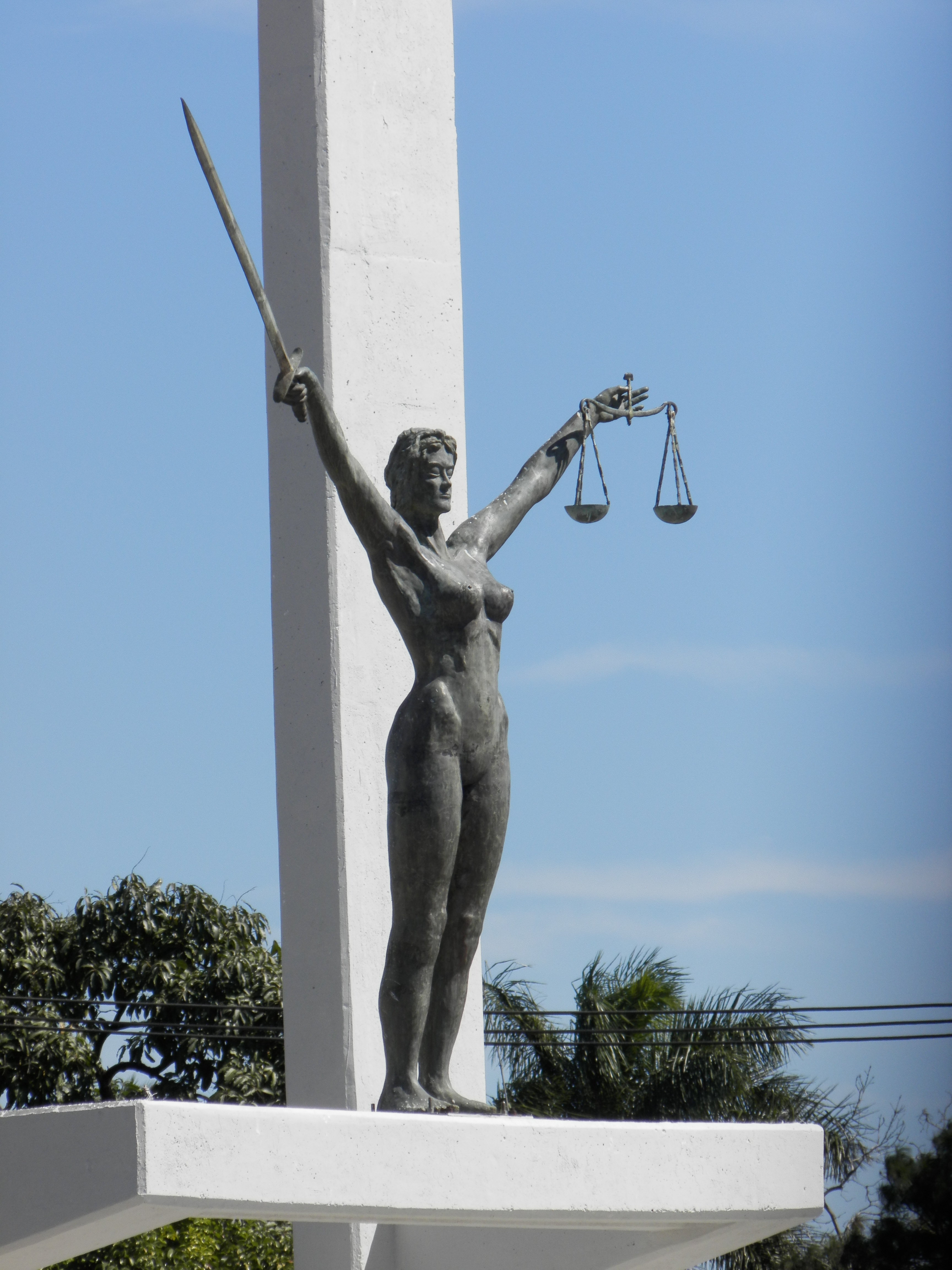 Monumento a La Constitución